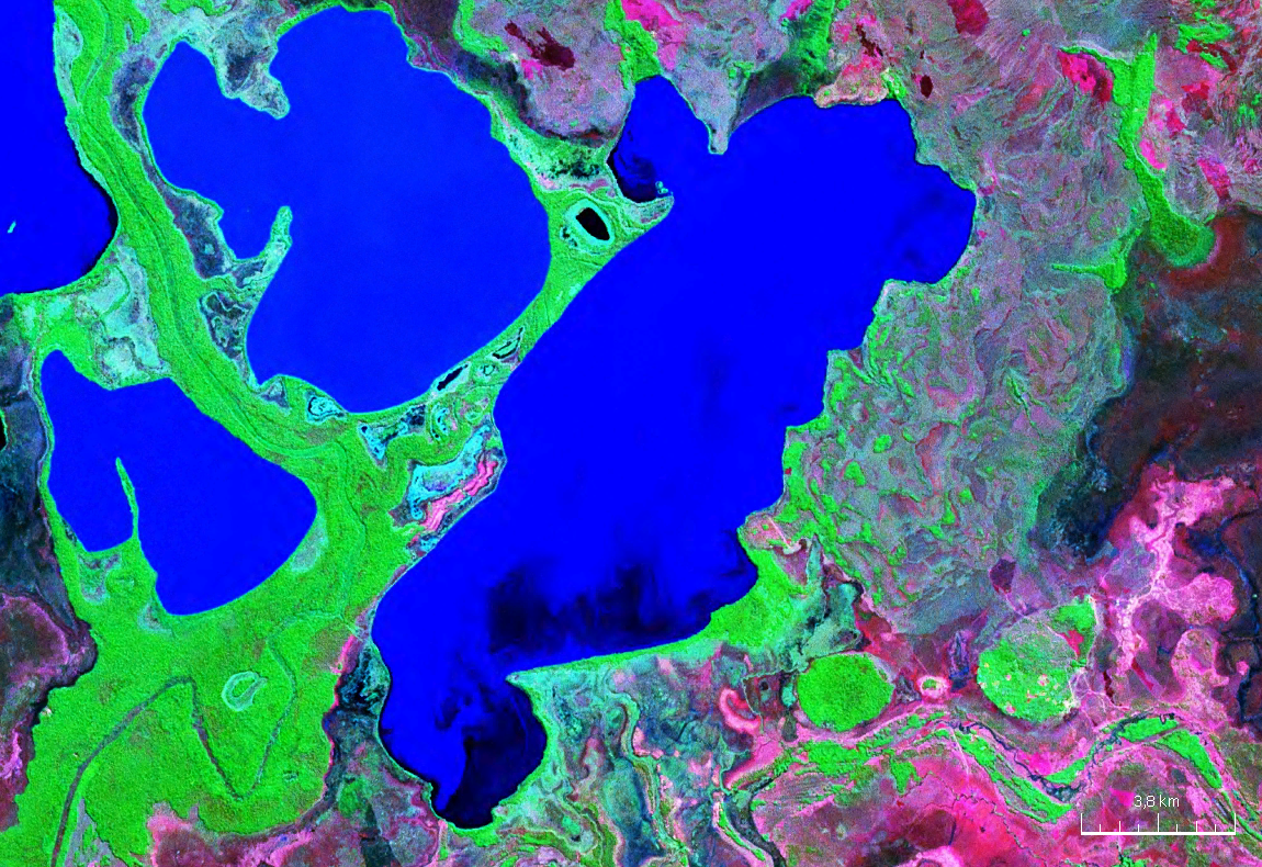 Vista satelital de la laguna Guachuna ubicada en el departamento del Beni (Bolivia).